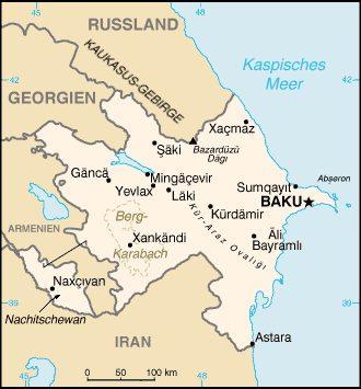 Karte von Aserbeidschan aus hochgeladen. Lizenz: Gemeinfrei